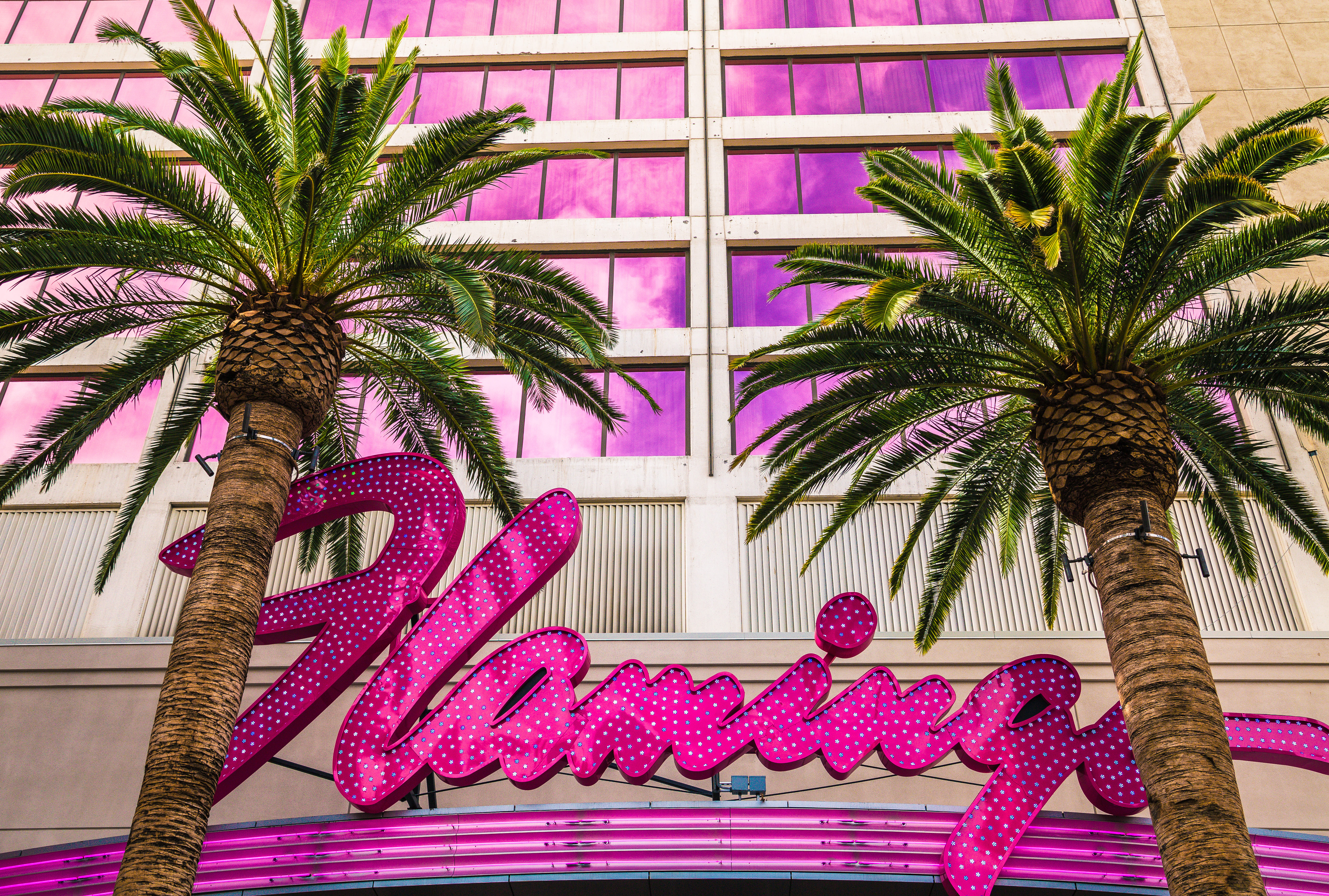 Las Vegas, Nevada